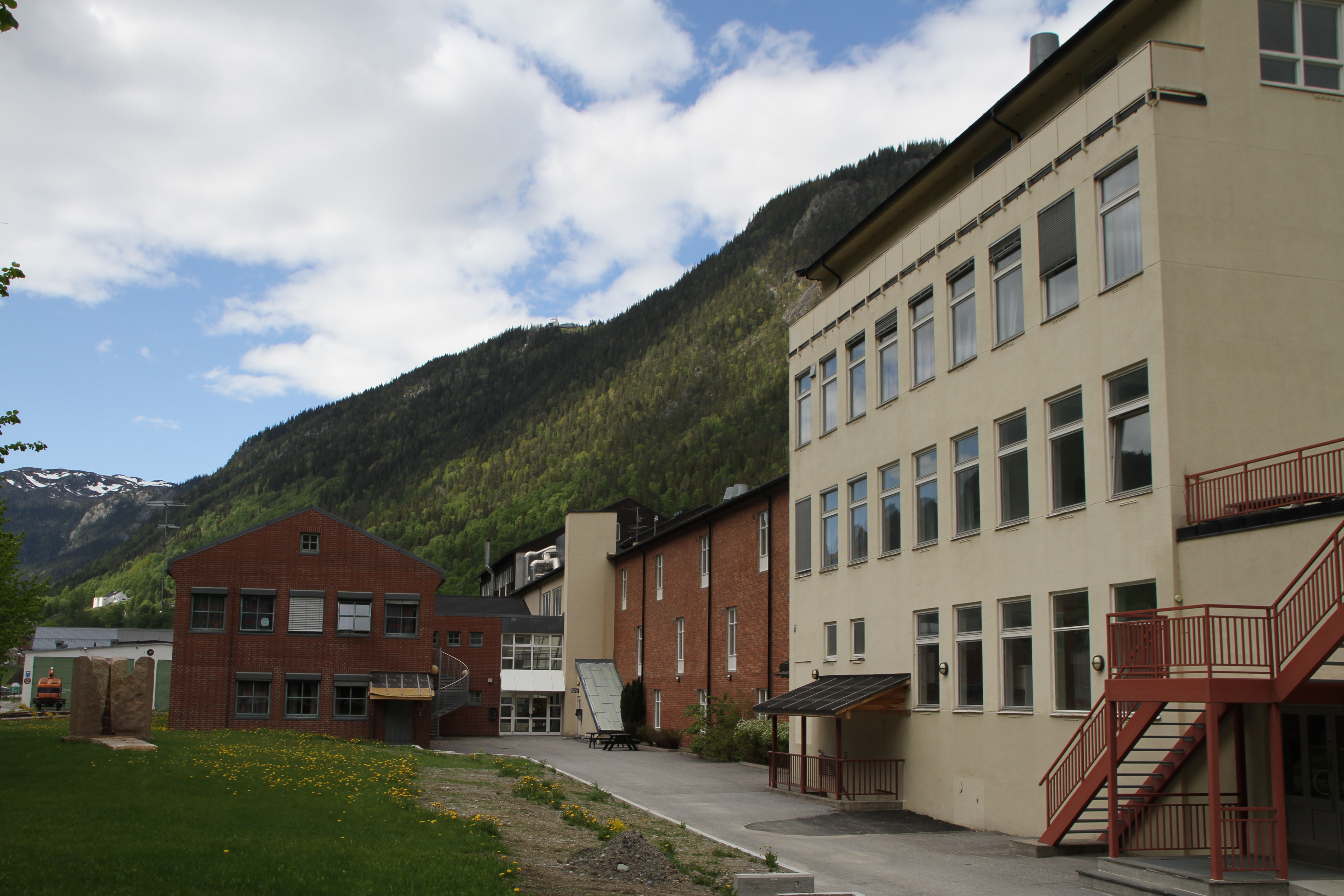 Rjukan videregående skole